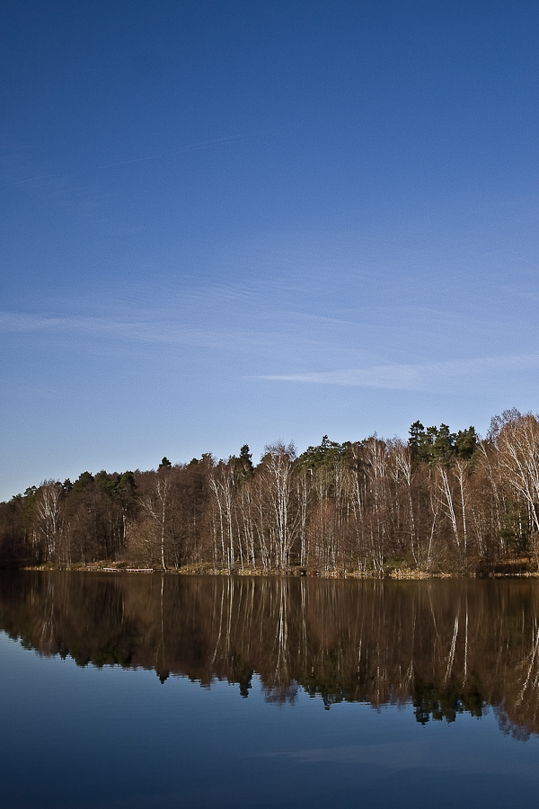 Горенка близ Разинского шоссе